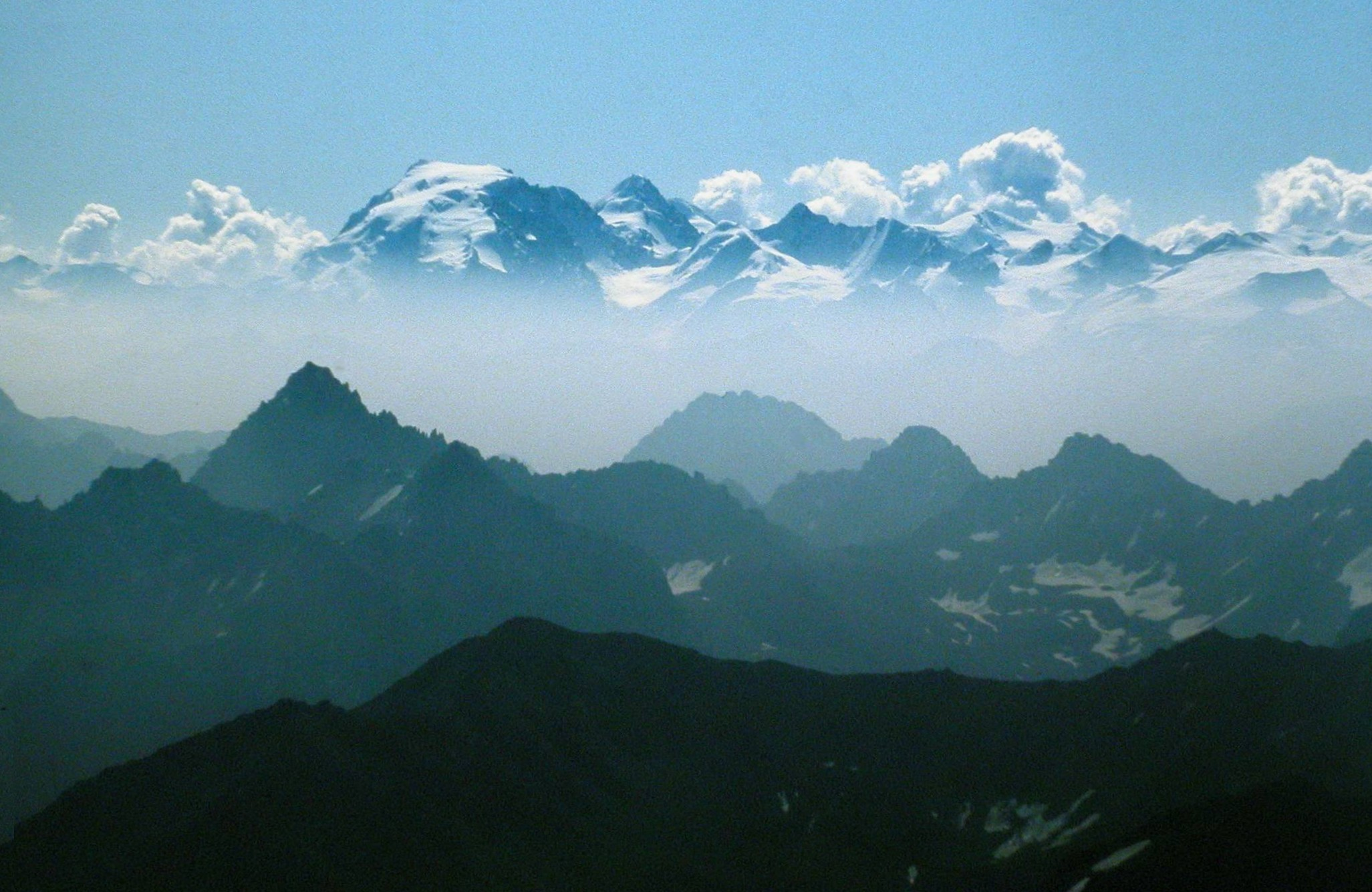 Blick vom Gipfel des Piz Linard (Silvretta) auf den ca. 50 km entfernten Ortler, aufgenommen mit 300mm-Teleobjektiv